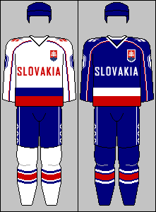 Slovak national team jerseys from World Championship 'B' 1995